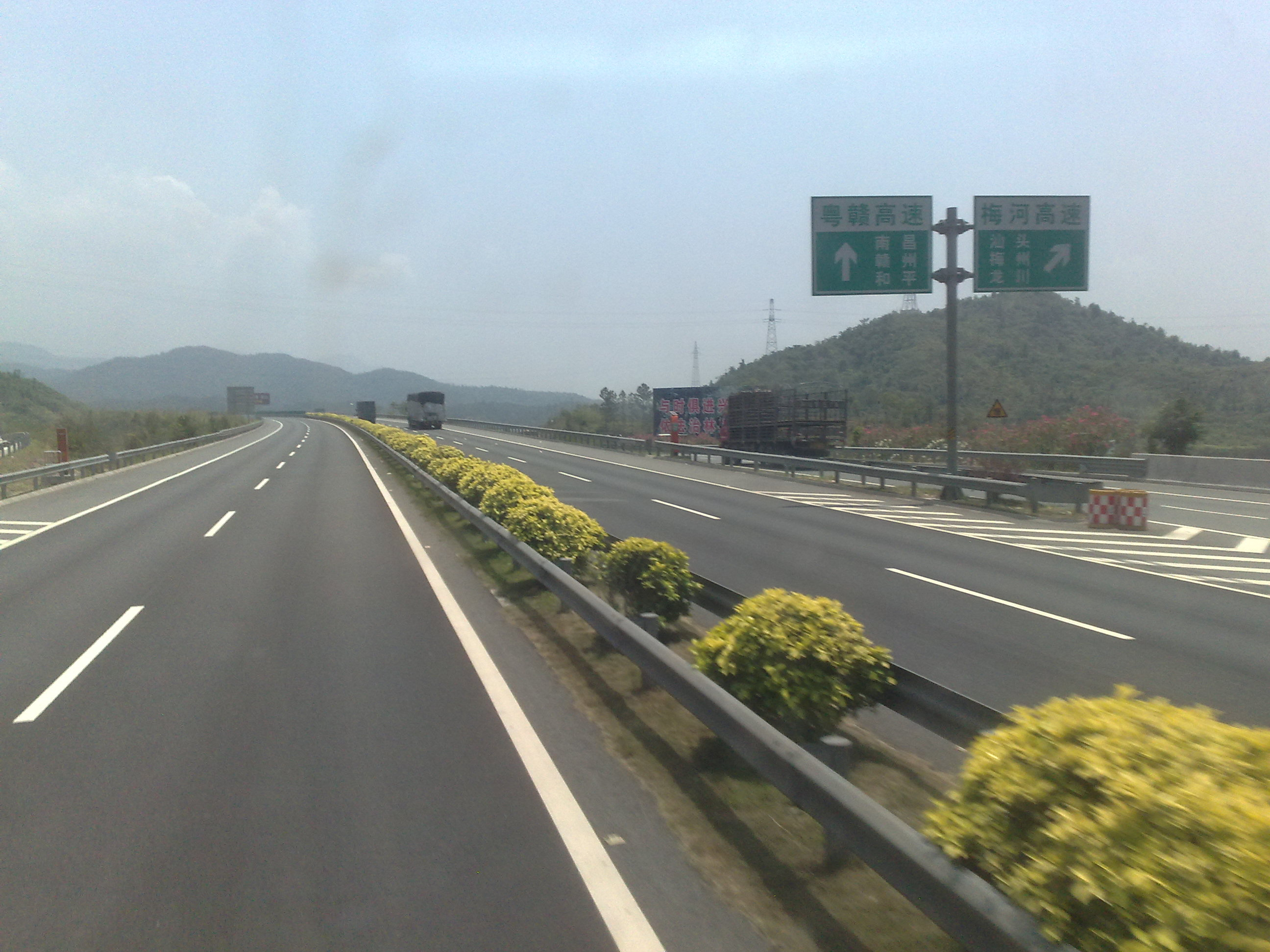 廣東粵贛高速公路河源起點